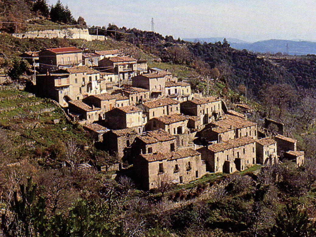 Borgo Fantino di San Giovanni in Fiore, un borgo oramai disabitato. Solo in occasione della festa del patrono del borgo, che si svolge nel mese di Settembre, lo stesso si rianima di persone, che hanno un legame storico con il villaggio.